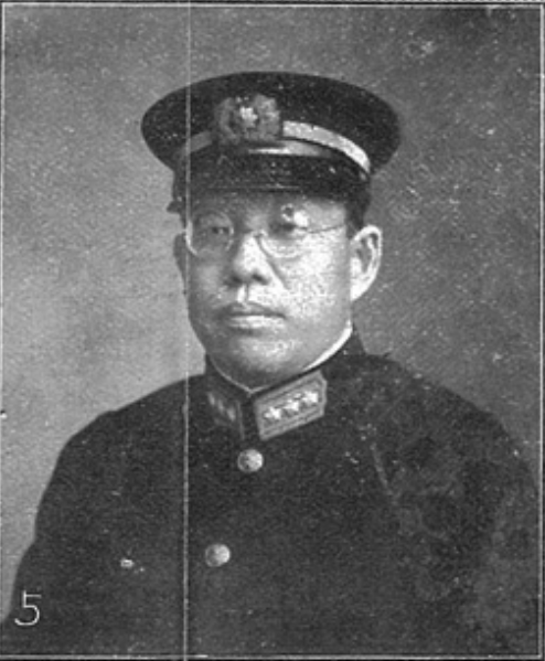 佐藤 続